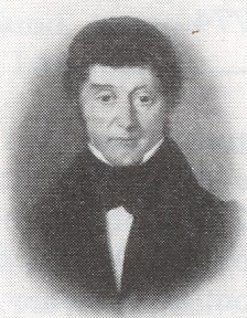 Arent Schøning (1781-1848). Opphavsrett løper ut etter 70 år, og bildet er fra tidlig på 1800-tallet.